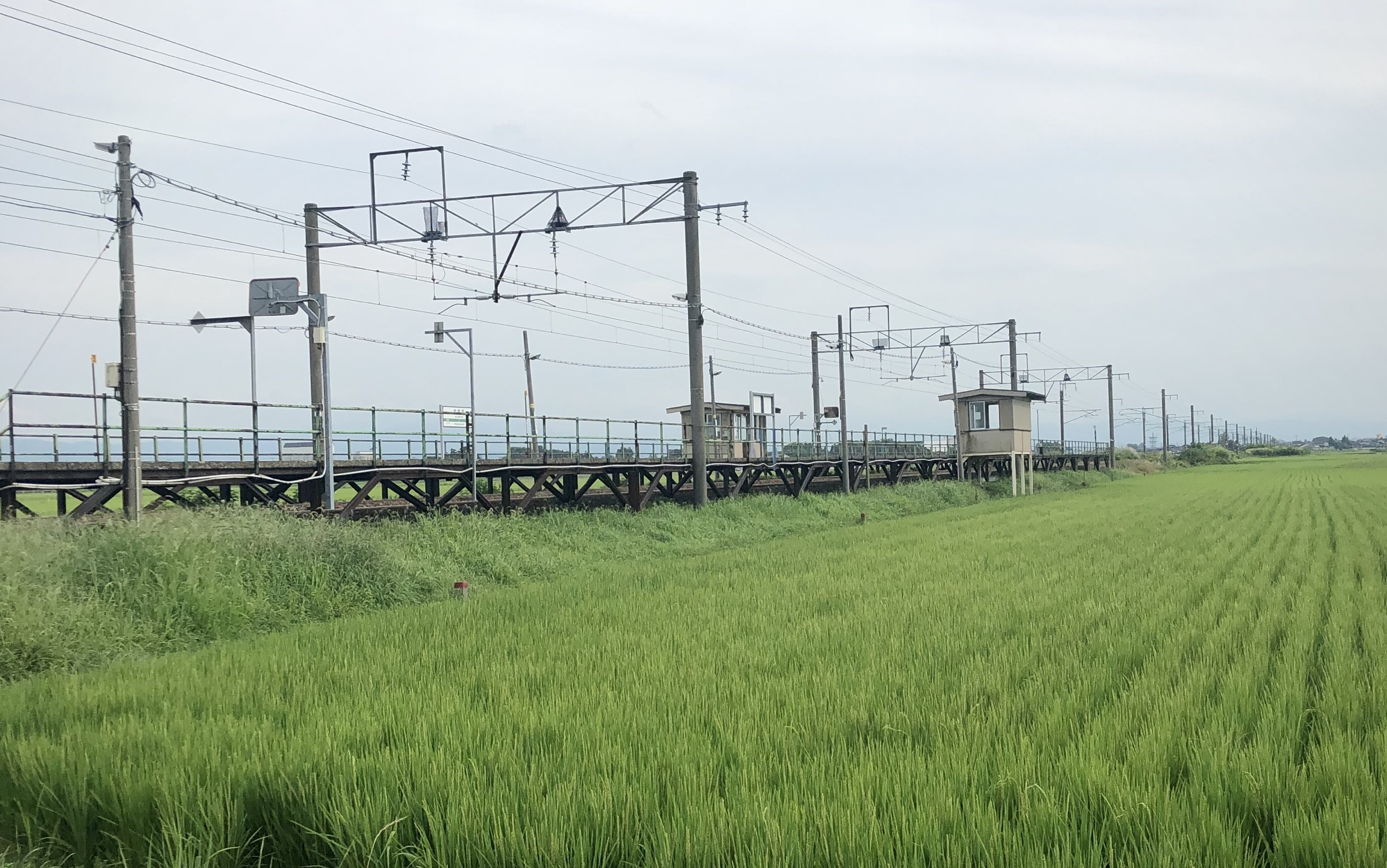 北余目駅近景